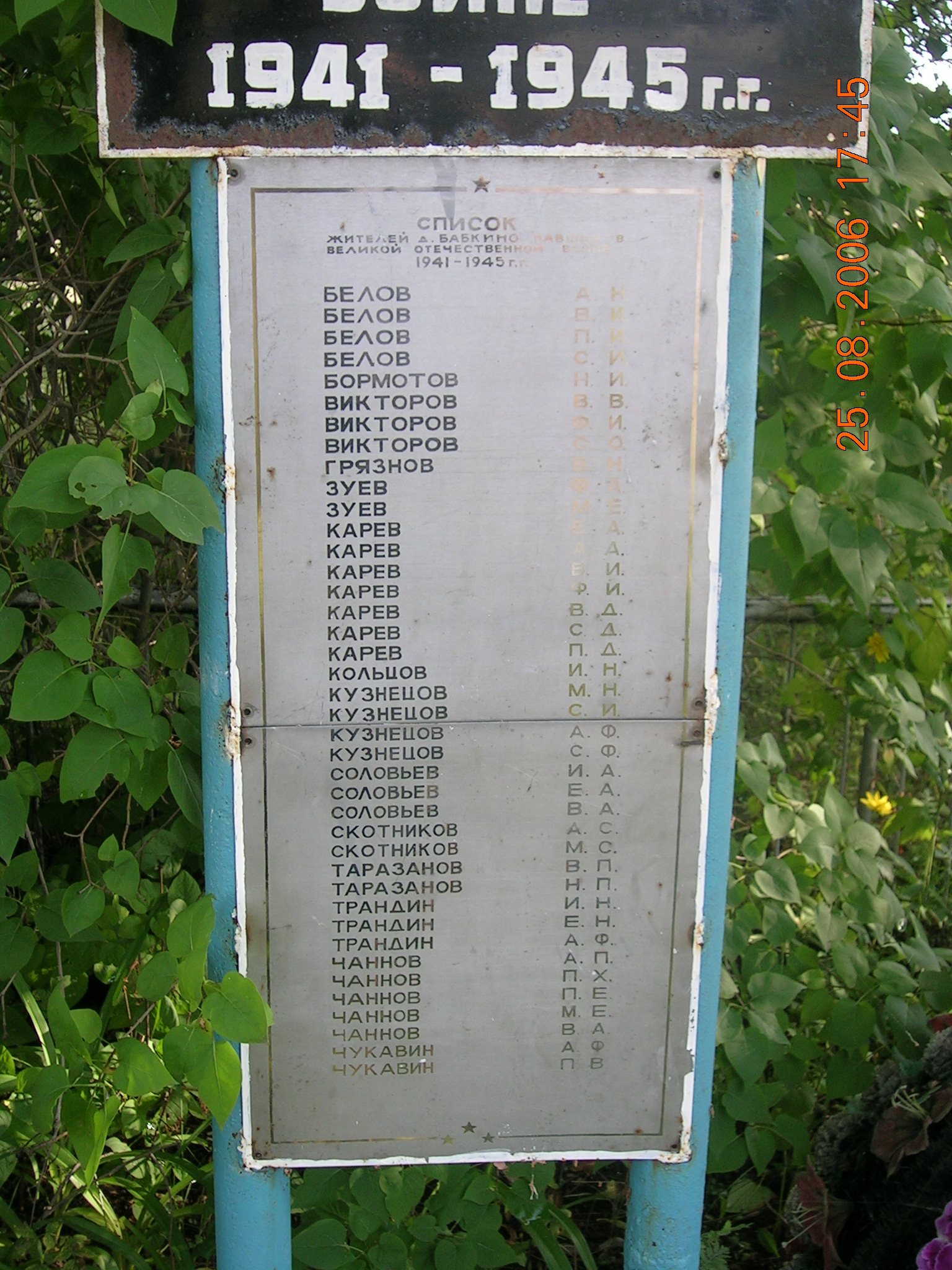 Жители д. Бабкино, павшие в Великой Отечественной войне. Список на Памятнике.